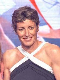 La ciudad de Madrid acogió ayer la I Gala del Baloncesto Español, que ha premiado a los mejores jugadores y jugadoras de la temporada. Se entregó el Premio a la Mejor Jugadora en Competición Internacional, que había sido otorgado a Alba Torrens y que recogió en su nombre Elisa Aguilar.